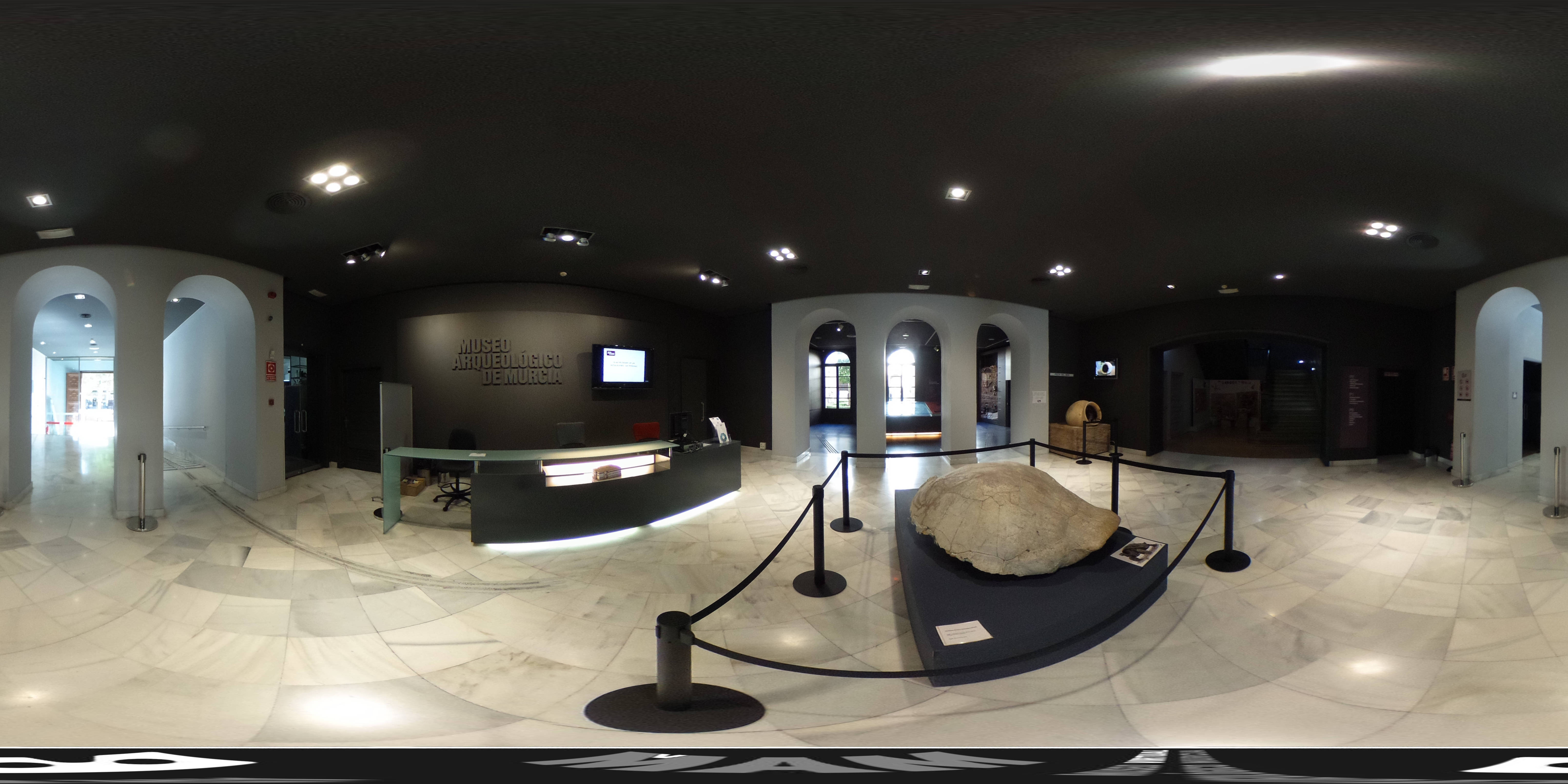 Recepción e información MAMProyecto MvAM